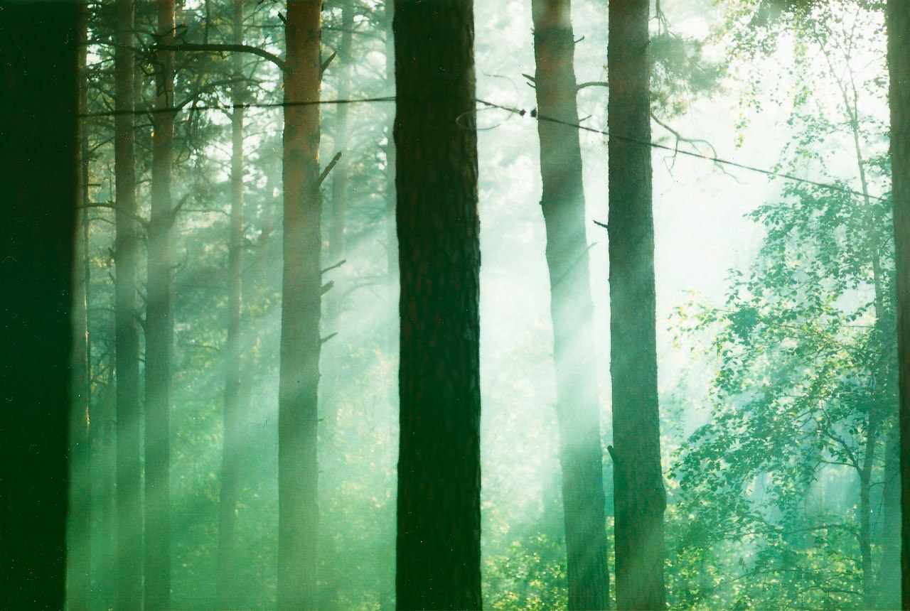 Ильменский им. В. И. Ленина: Заповедник расположен в восточных предгорьях Южного Урала на Ильменском хребте, в Челябинской области к северо-востоку от г. Миасс. Филиал "Аркаим" находится в Брединском и Кизильском районах Челябинской области, в долине реки Большая Караганка.,Аргаяшский район, Челябинская область This image is related to the protected area of Russia number 7400204